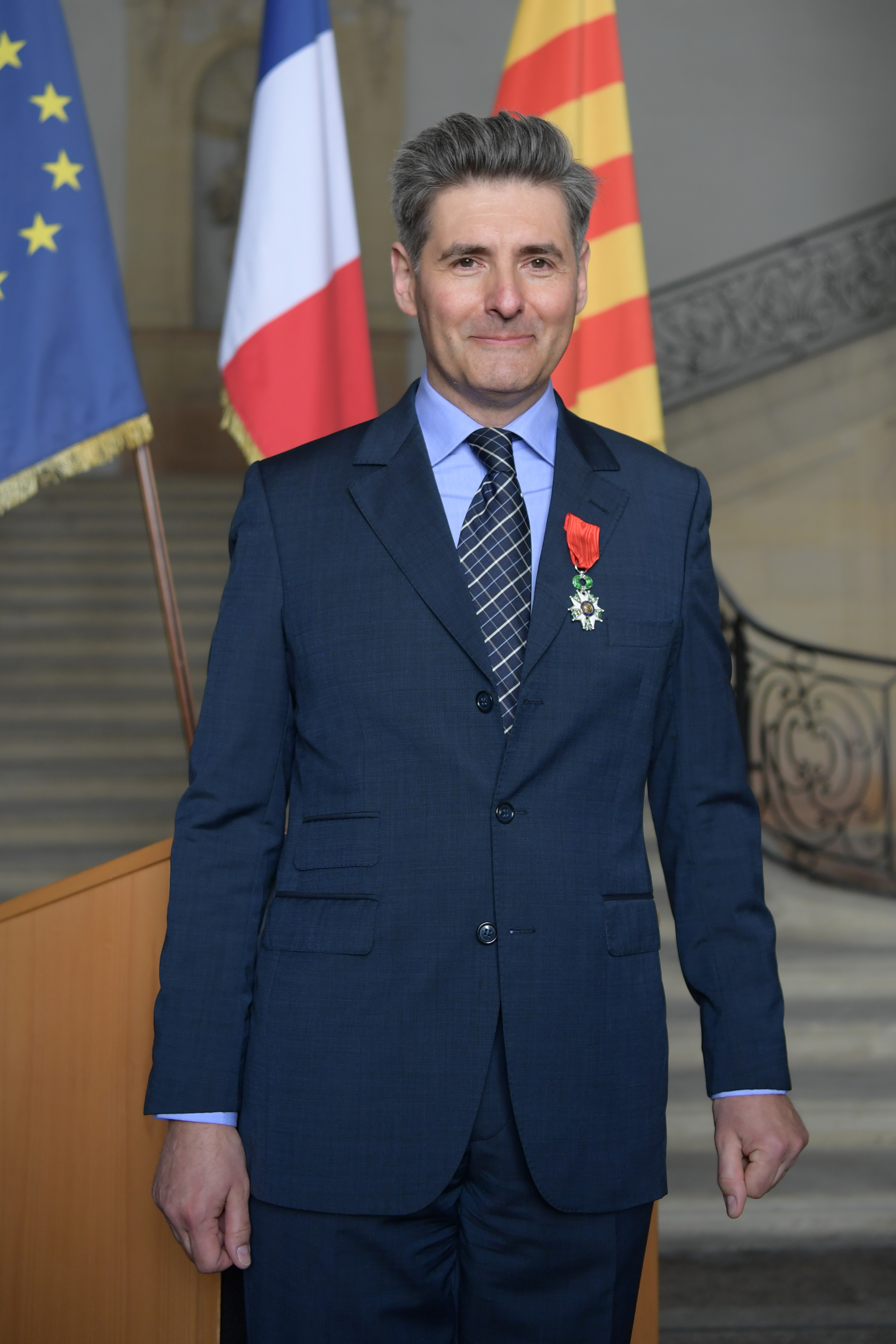 Jean-François Delmas conservateur général chevalier de la Légion d'honneur